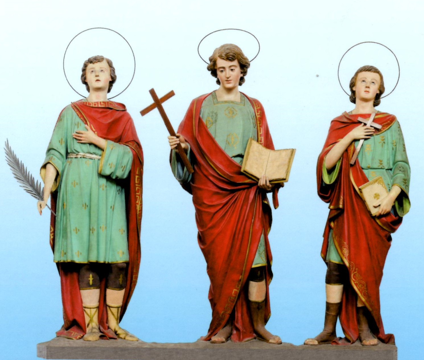 Venerati a Paternò nella chiesa di Santa Caterina d'Alessandria.